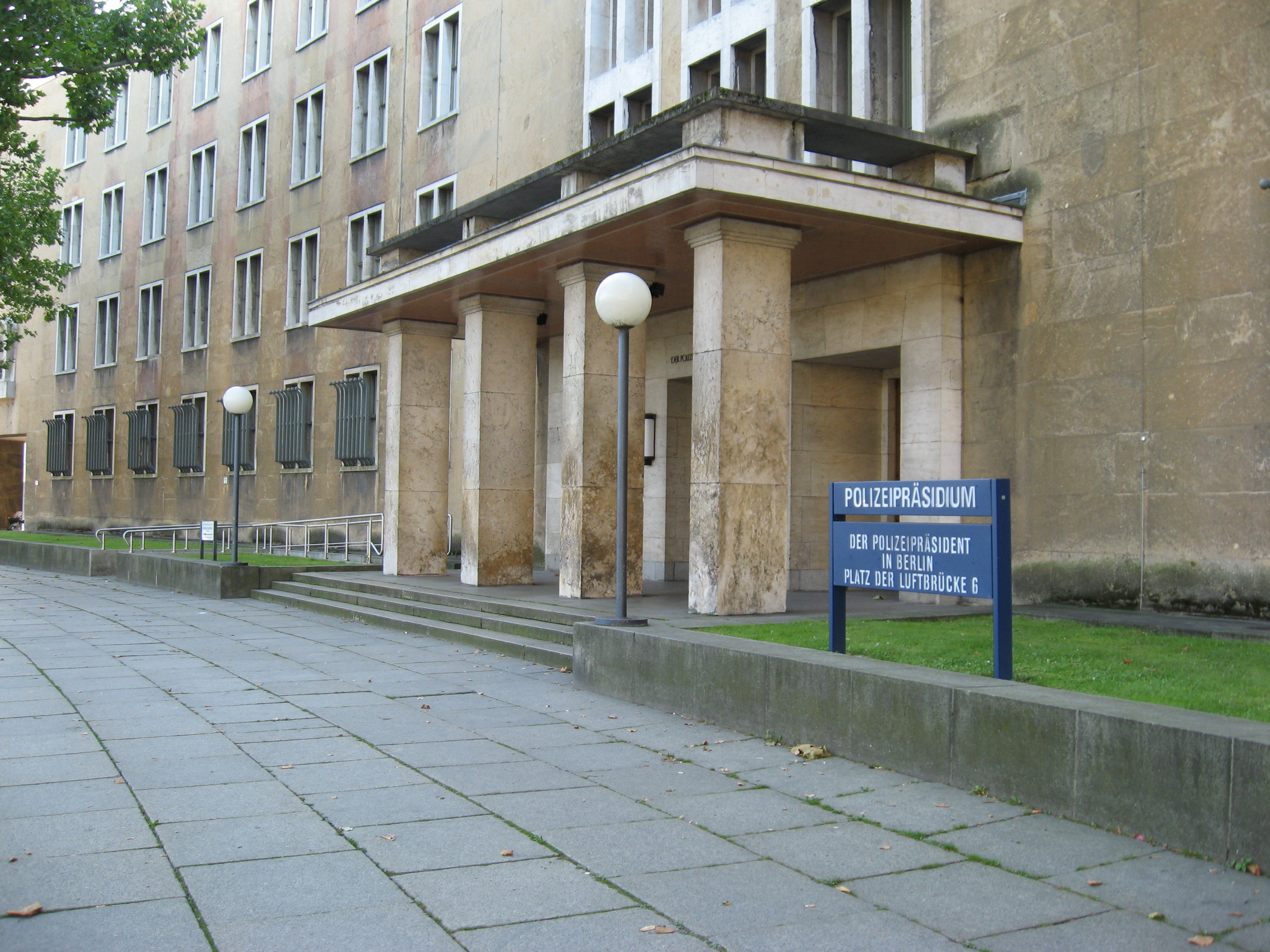 Haupteingang Polizeipräsidium Berlin am Platz der Luftbrücke